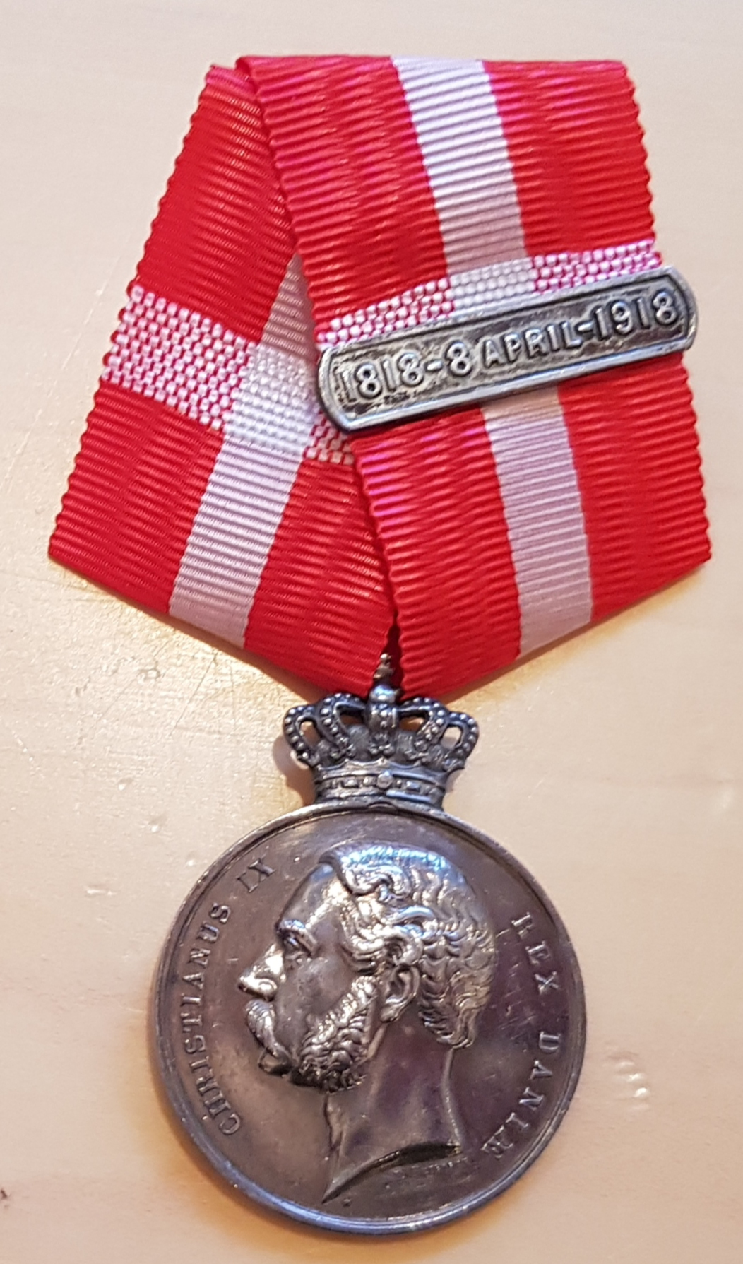 Mindemedaljen i anledning af 100-årsdagen for Kong Christian 9.s fødsel (1)